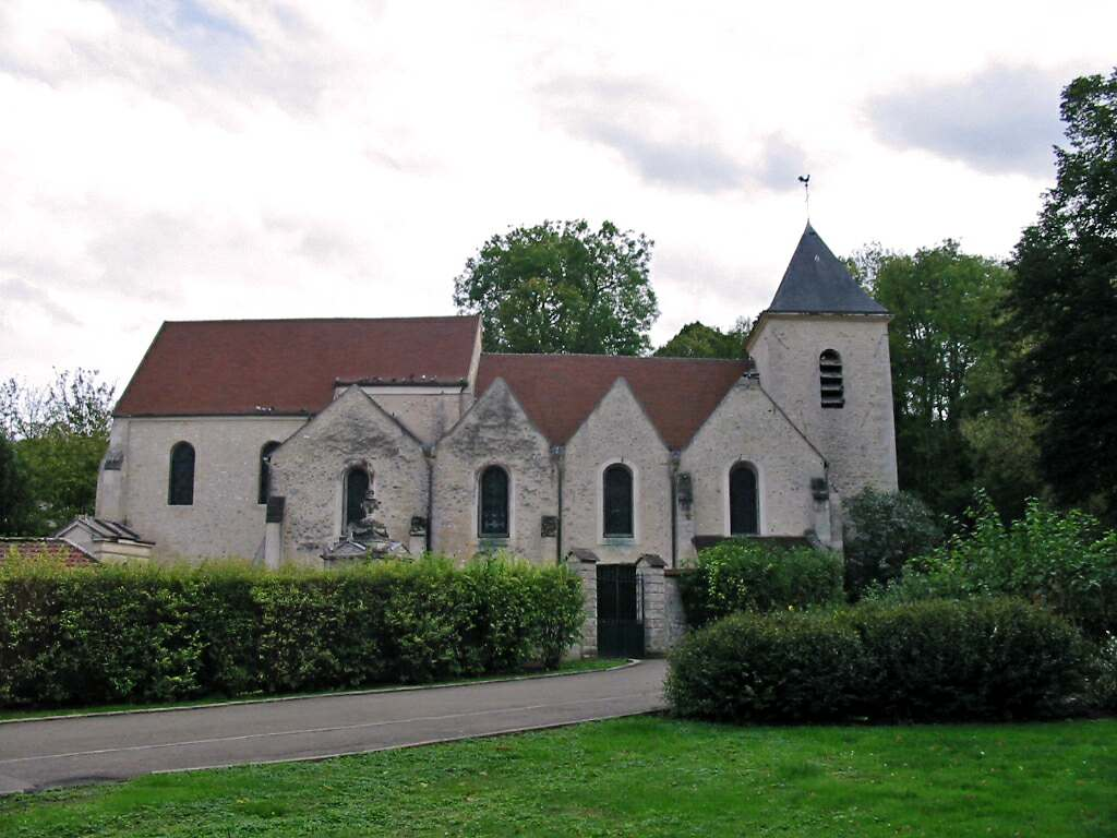 Église de Flins-sur-Seine (Yvelines) Photo JH Mora, novembre 2005